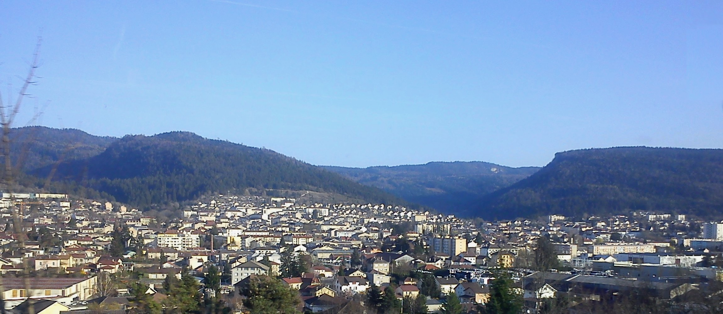 Vue générale d'Oyonnax